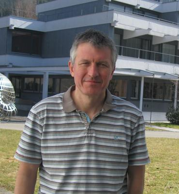 Foto di Chris Holmes